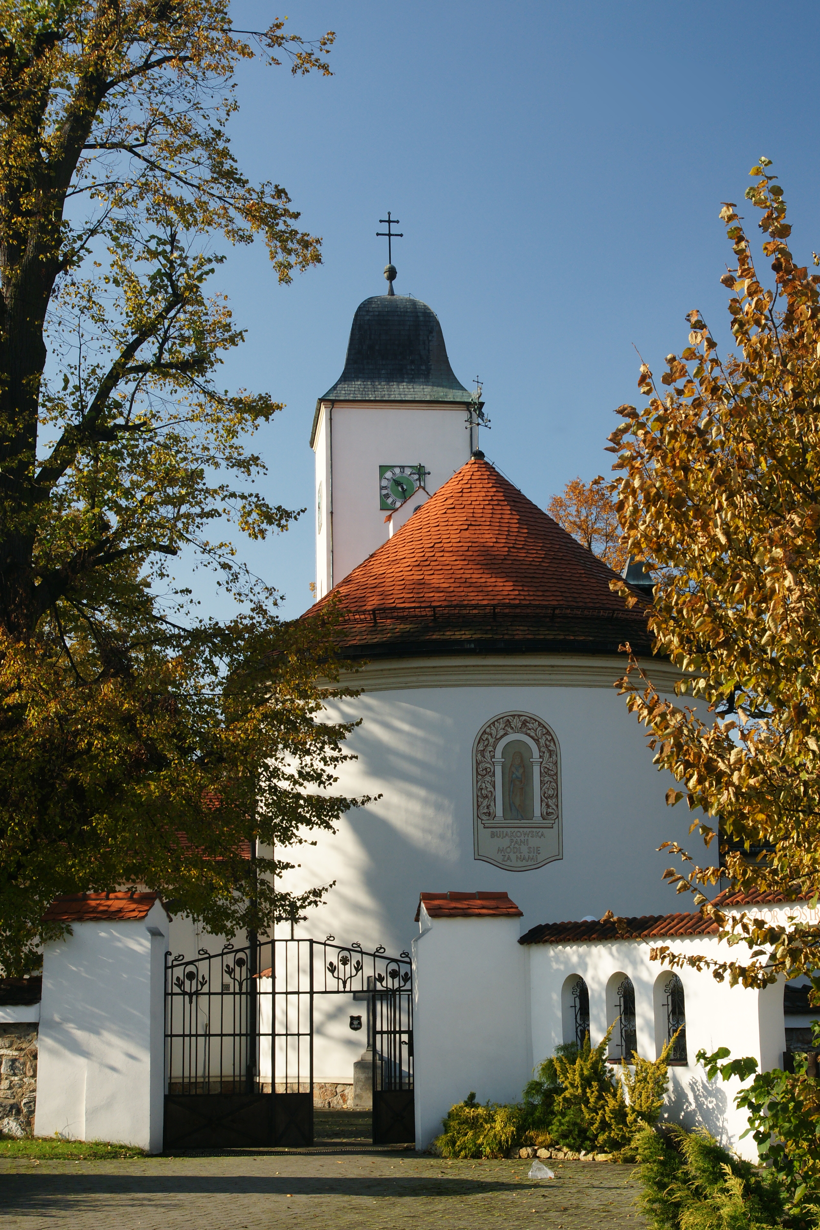 Kosciol sw Mikolaja Mikołow- Bujaków